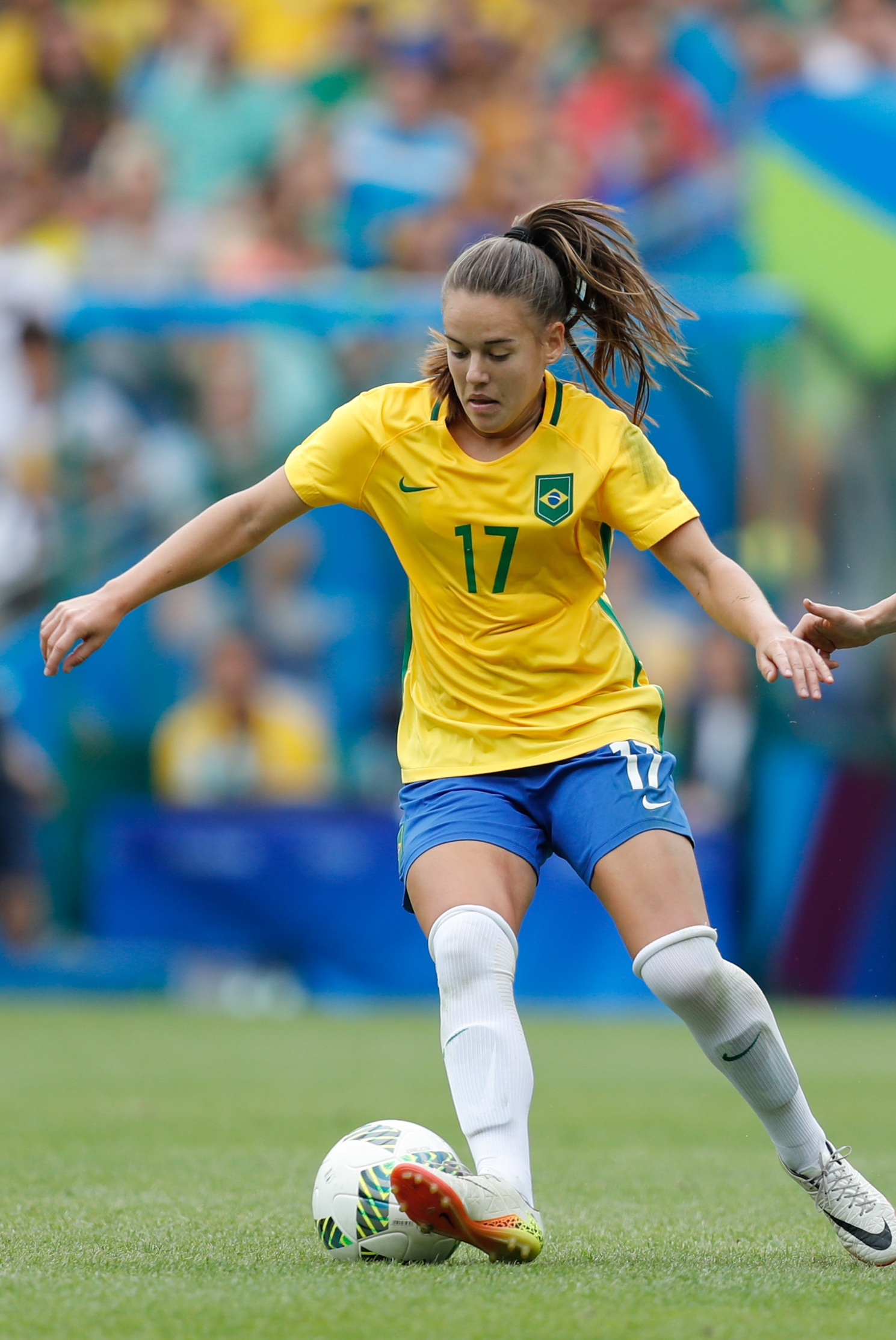 Rio de Janeiro - Seleção brasileira de futebol feminino disputa semifinal com a Suécia, no Maracanã. O Brasil perde nos pênaltis e vai disputar o bronze (Fernando Frazão/Agência Brasil)